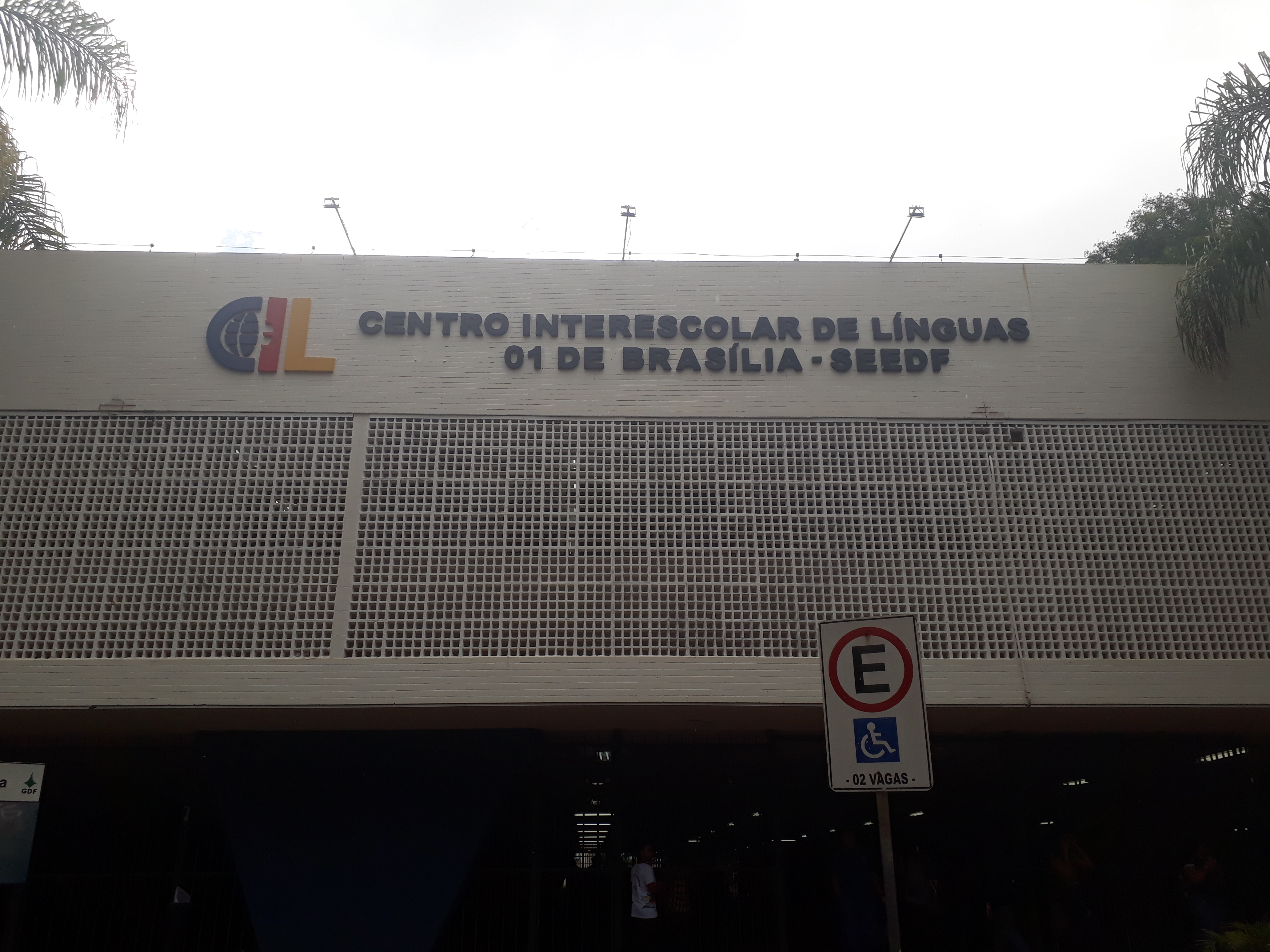 Fachada del CIL 1 de Brasilia.